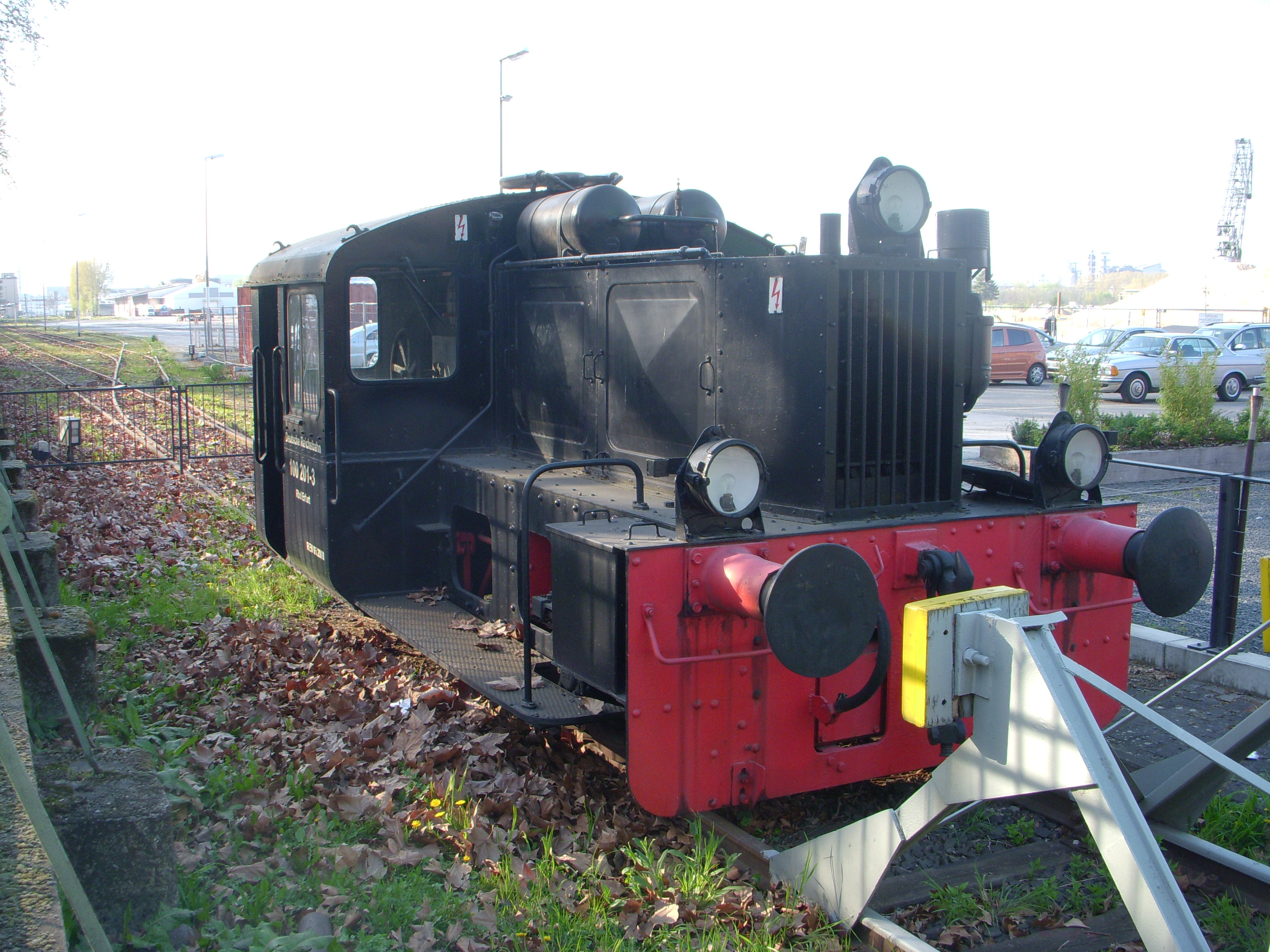 Kleinlokomotive 100-201-3 neben der Kunsthalle Mainz, früher Deutsche Reichsbahn, Reichsbahndirektion Erfurt